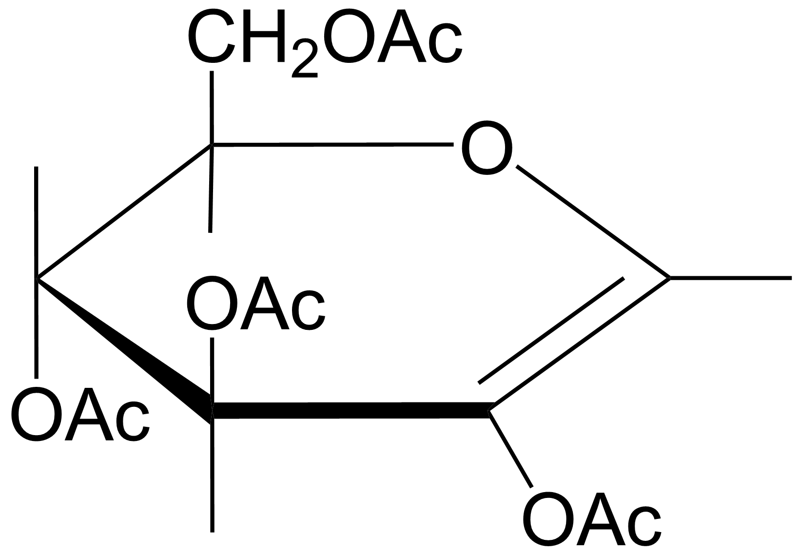 2,3,4,5-пента-О-ацилглюкозеен в проекции Фишера